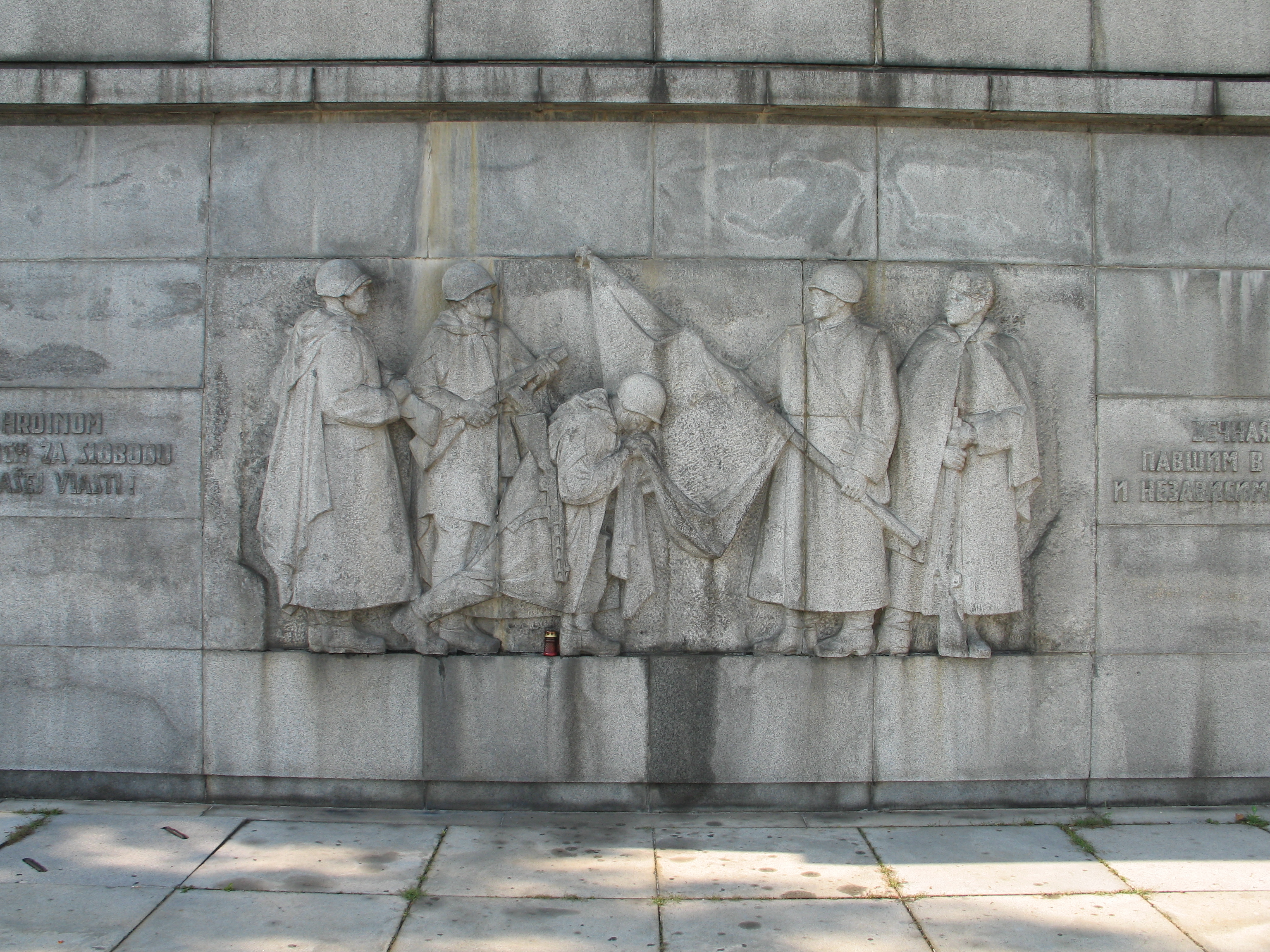 Reliéf na bratislavskom Slavíne pripomína cestu bojovej slávy Sovietskej armády.